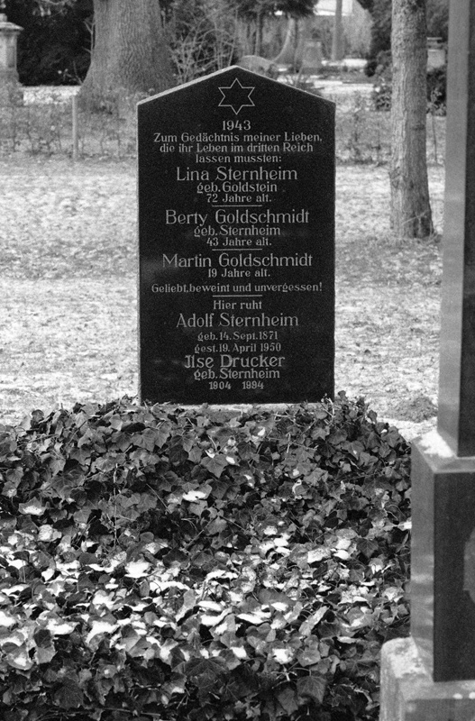 Adolf Sternheims Grab auf dem jüdischen Friedhof in Lemgo